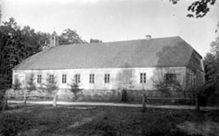 Беларуская (тарашкевіца): Язна (Jazna). Касьцёл Маці Божай Вастрабрамскай